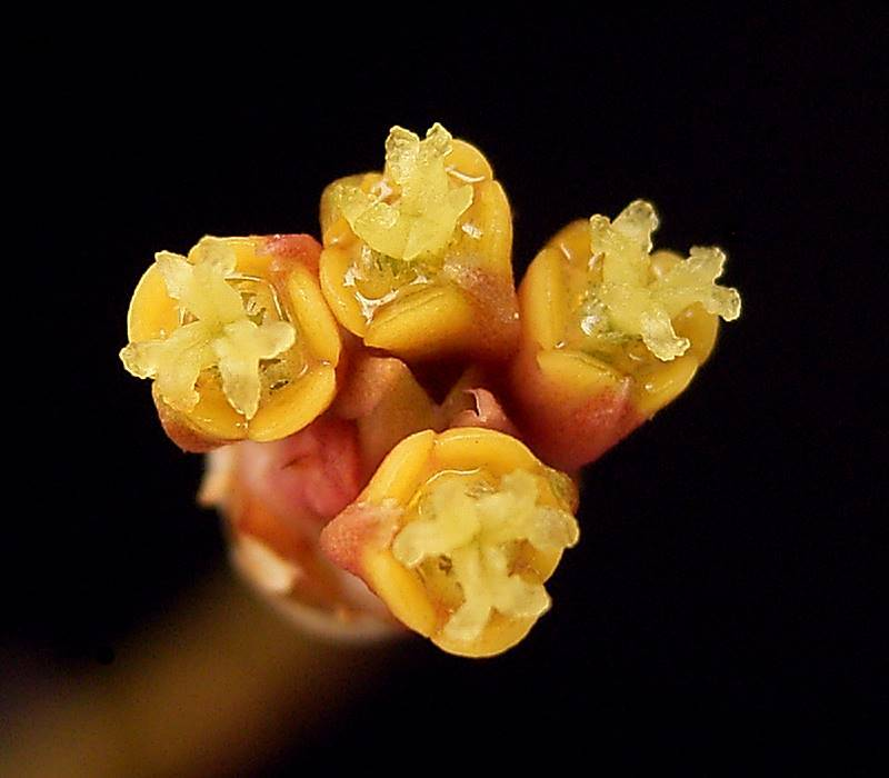 Euphorbia bongolavaensis